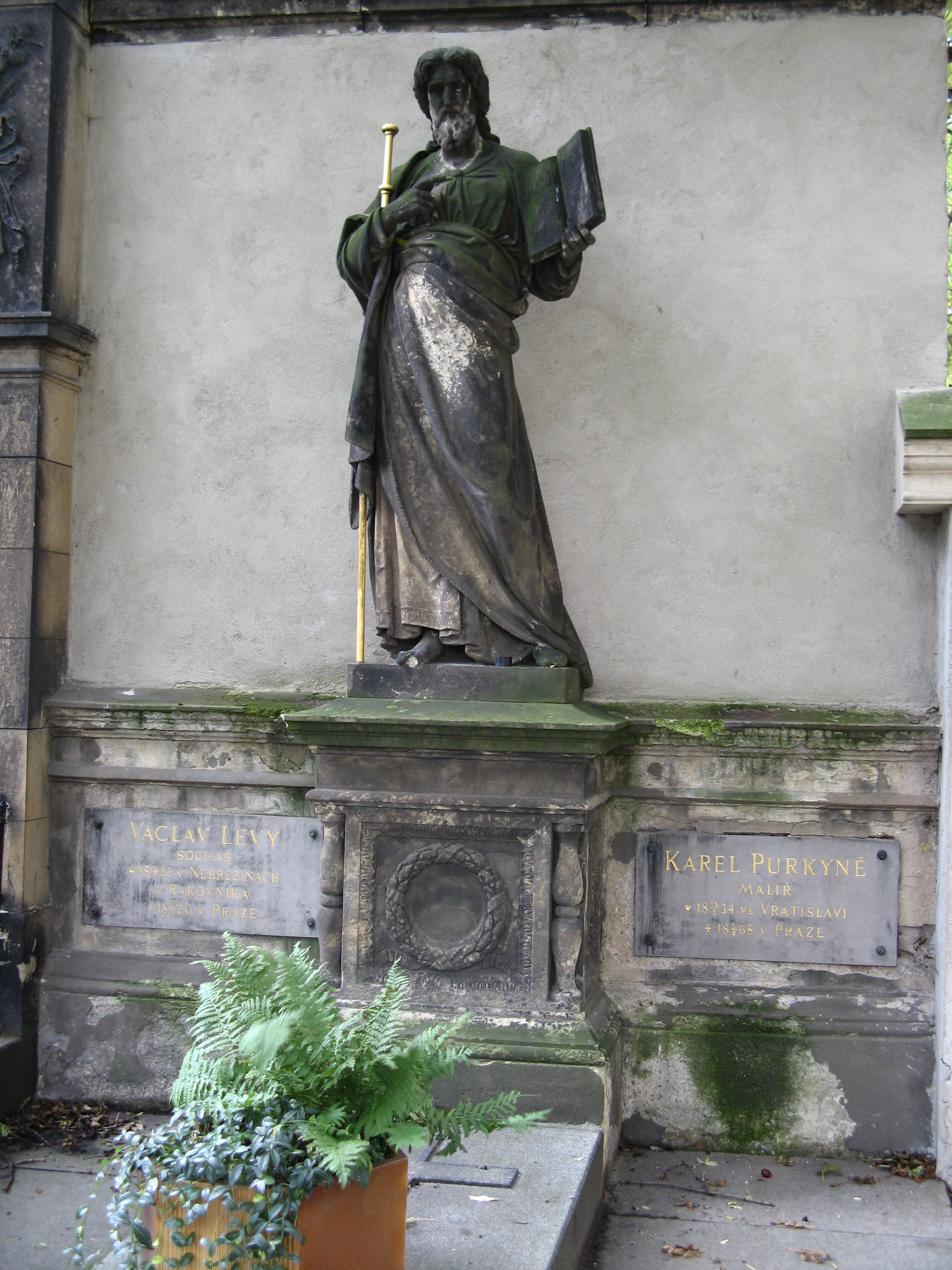 Grab des Malers Karel Purkyně, Vyšehrader Friedhof, Prag